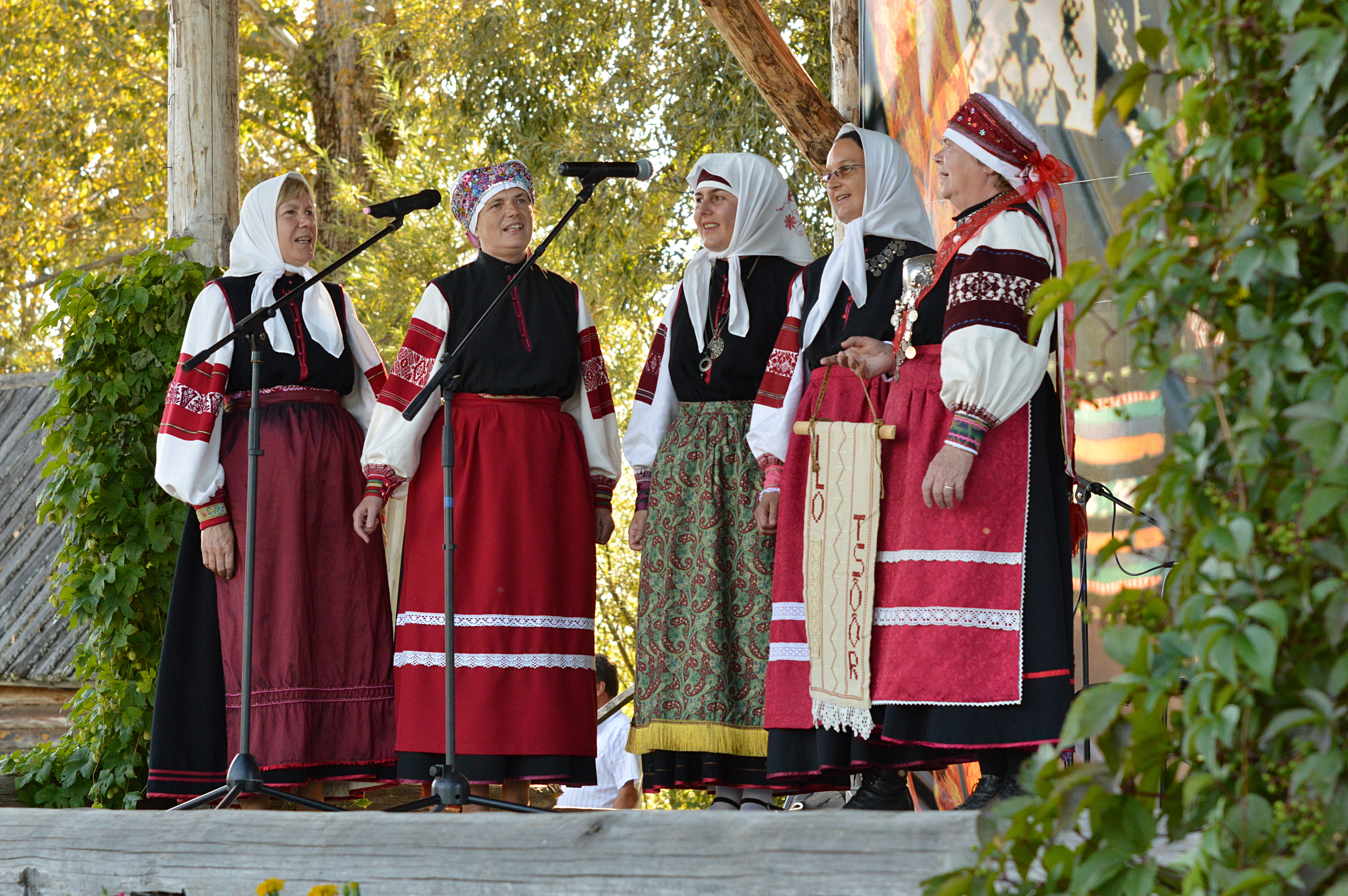 Seto kultuuri festival Radajal.